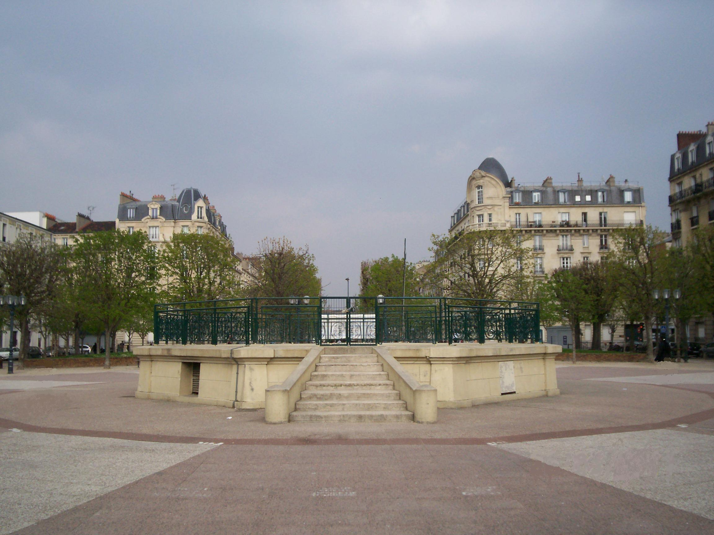 Place et kiosque à musique.